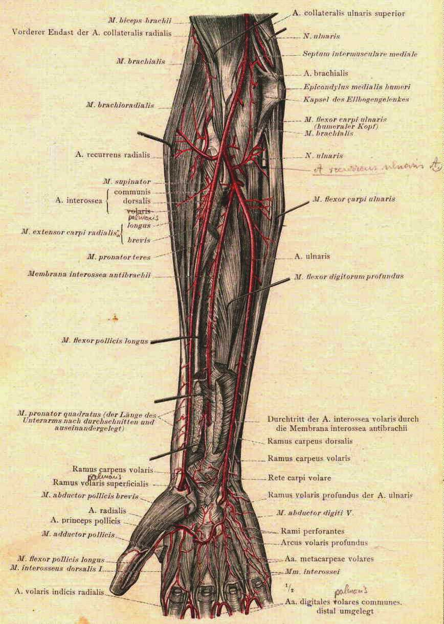 Az alkar ütőereinek tenyér-irányú ábrázolása